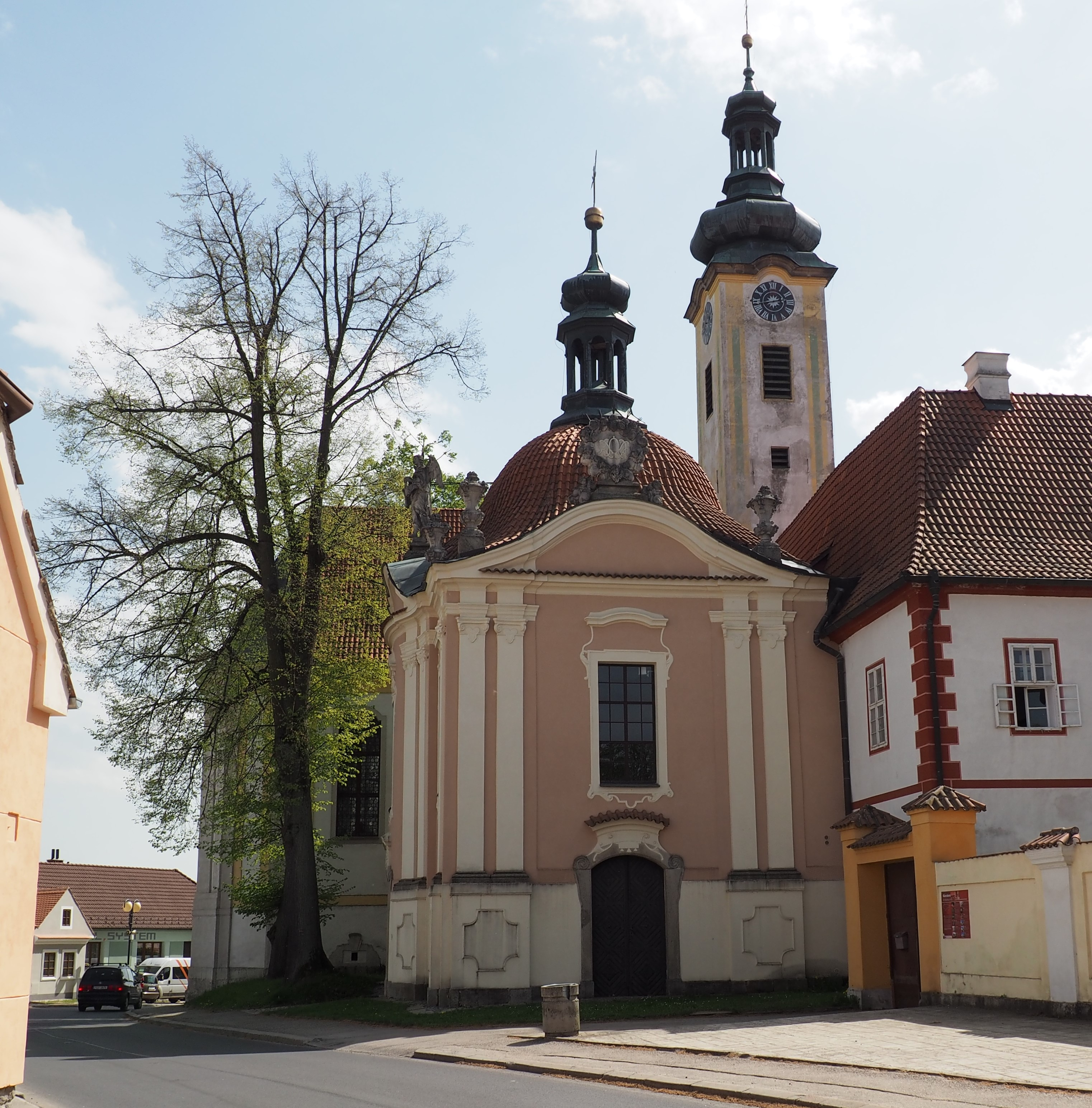 Fotografie z pohledu na Škapulířovou kapli